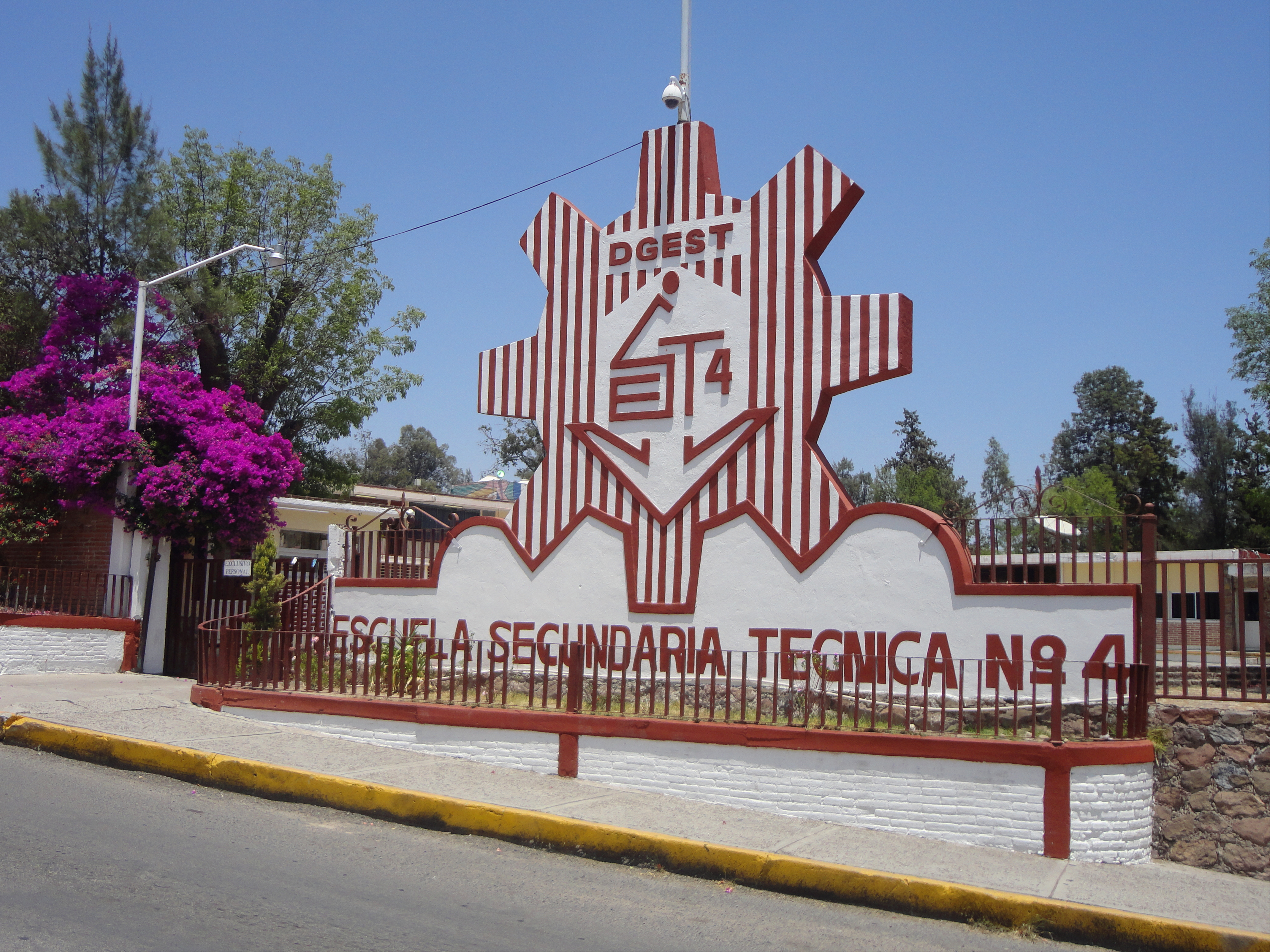 Escuela Secundaria Técnica N° 4 (DGEST). Dolores Hidalgo, Guanajuato, México.